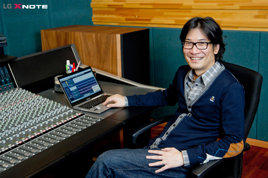 9.9초 부팅속도의 Lg xnote 울트라북 Z330 ! [9가지 이야기] 작곡가 전해성 편